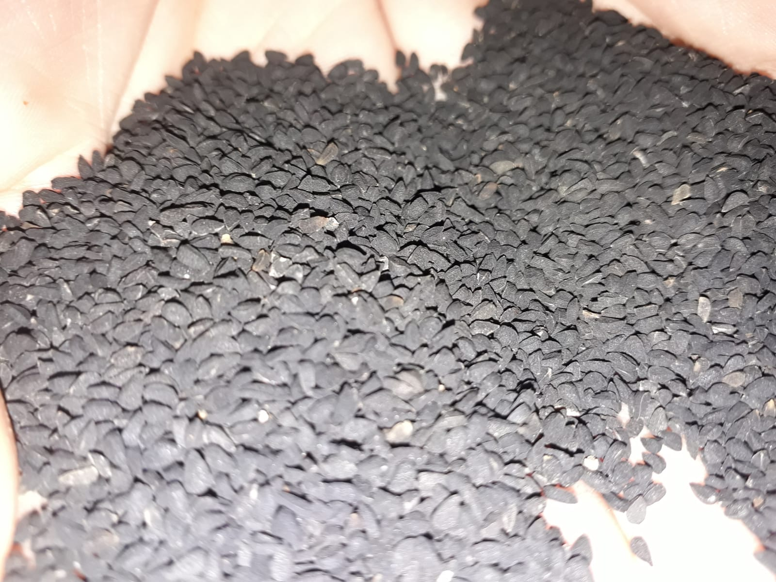 القزحة المصنوعة في مدينة نابلس